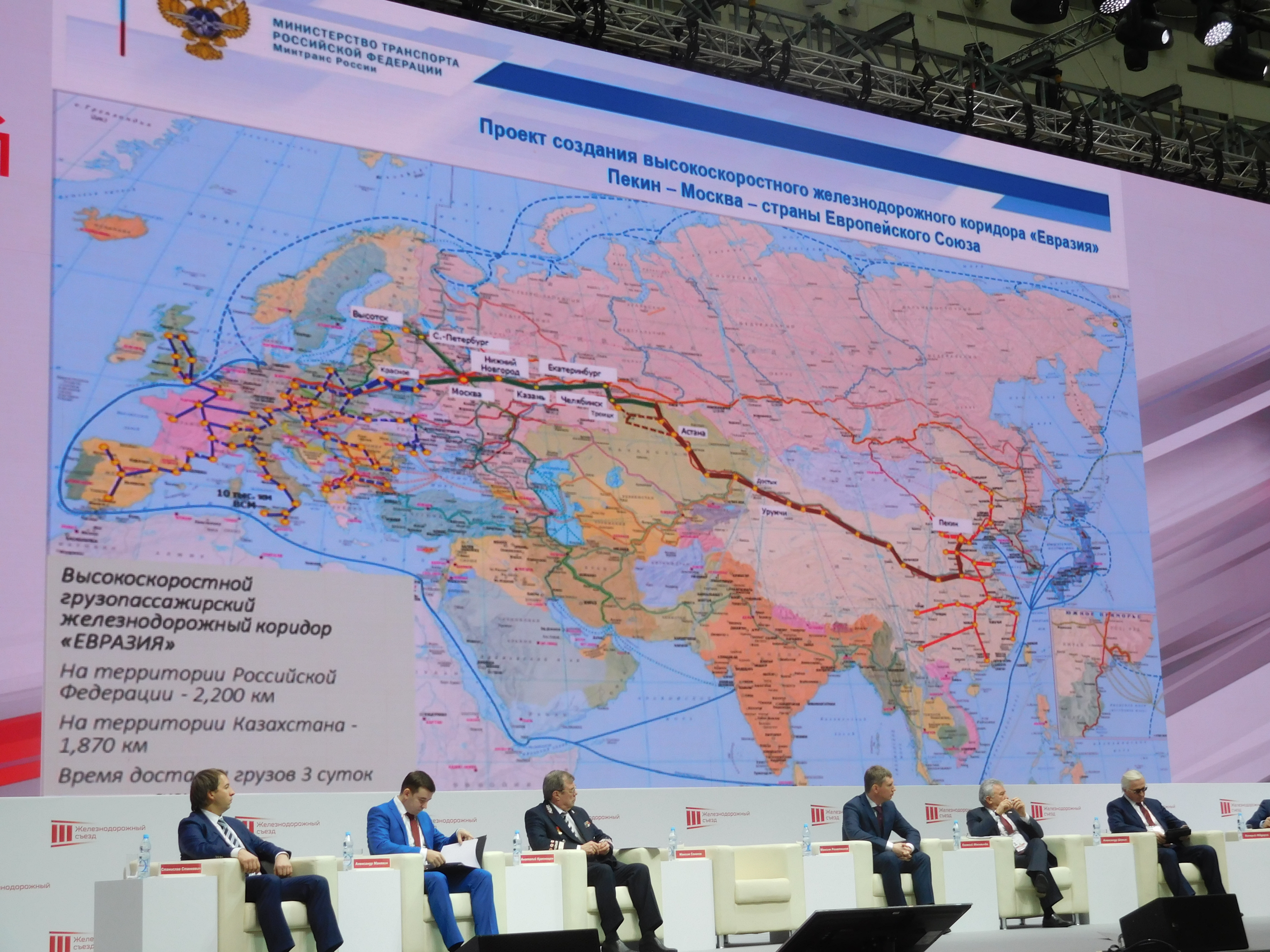 Пленарное заседание «Железная дорога. В интересах государства и клиента».